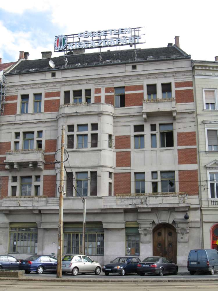 A volt Független Kisgazdapárt-székház (Budapest, V. ker., Belgrád rakpart 24.)